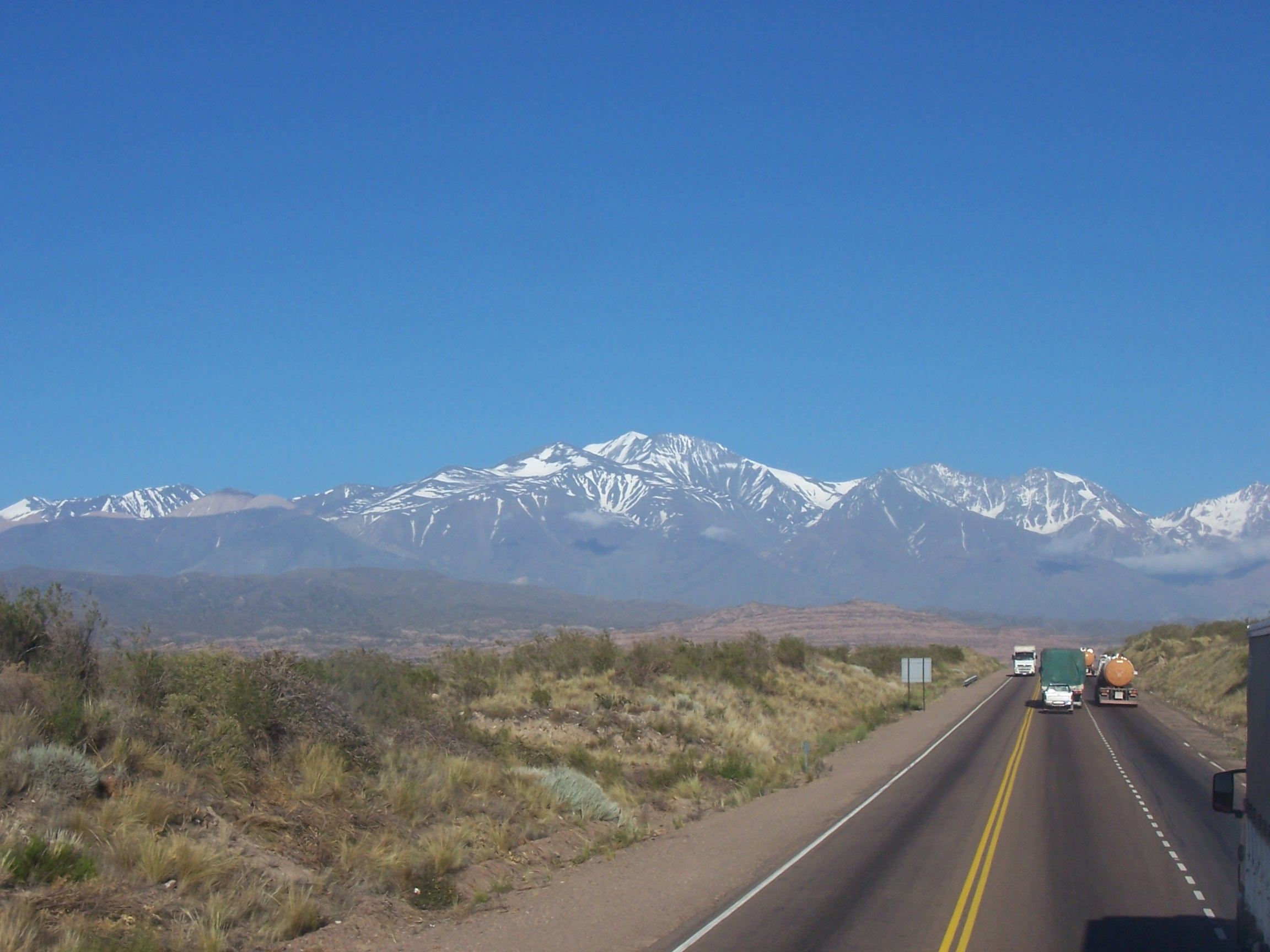 Ruta Nacional 7 en la provincia de Mendoza, Argentina.